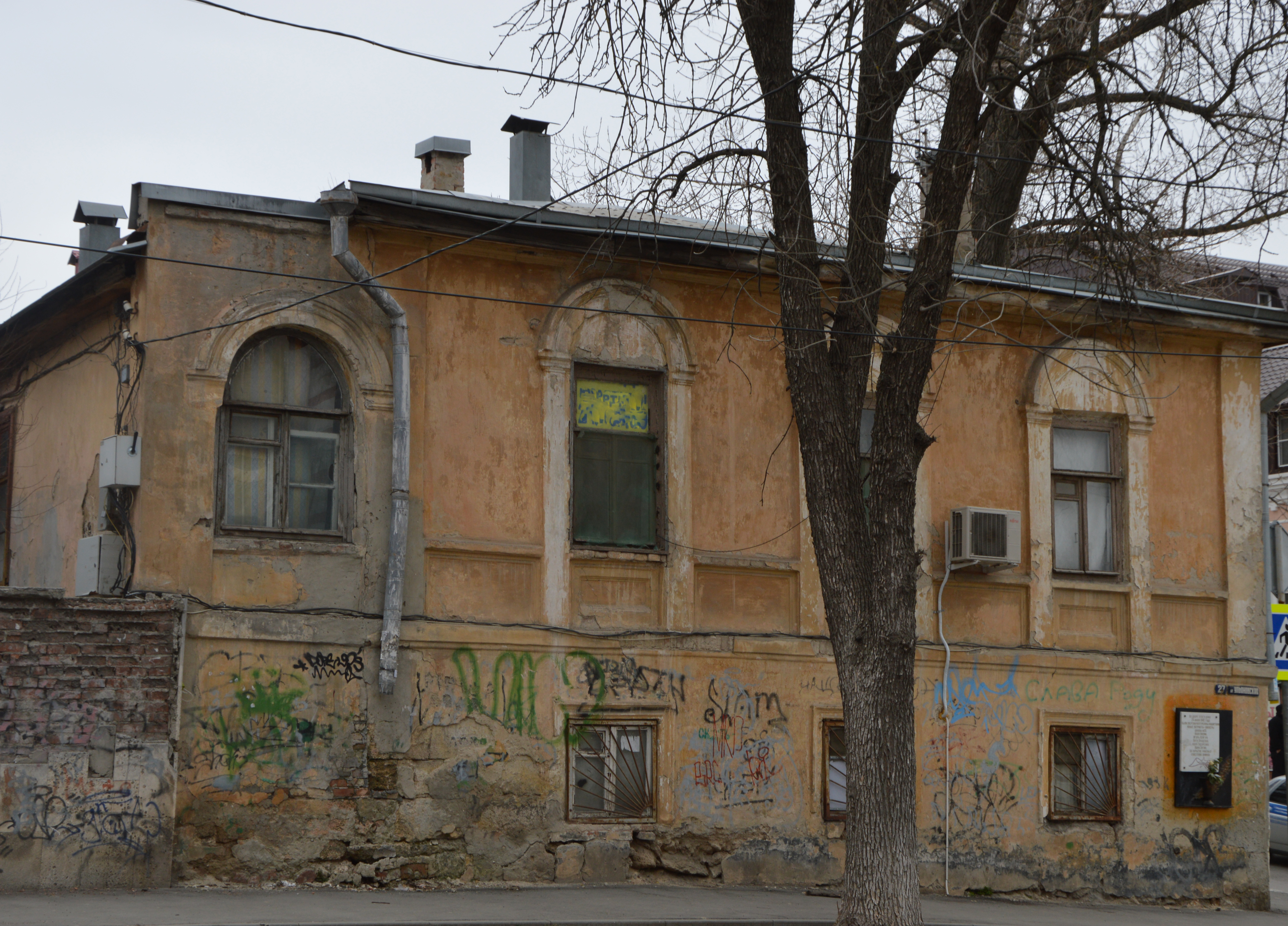 Здание города Ростова-на-Дону